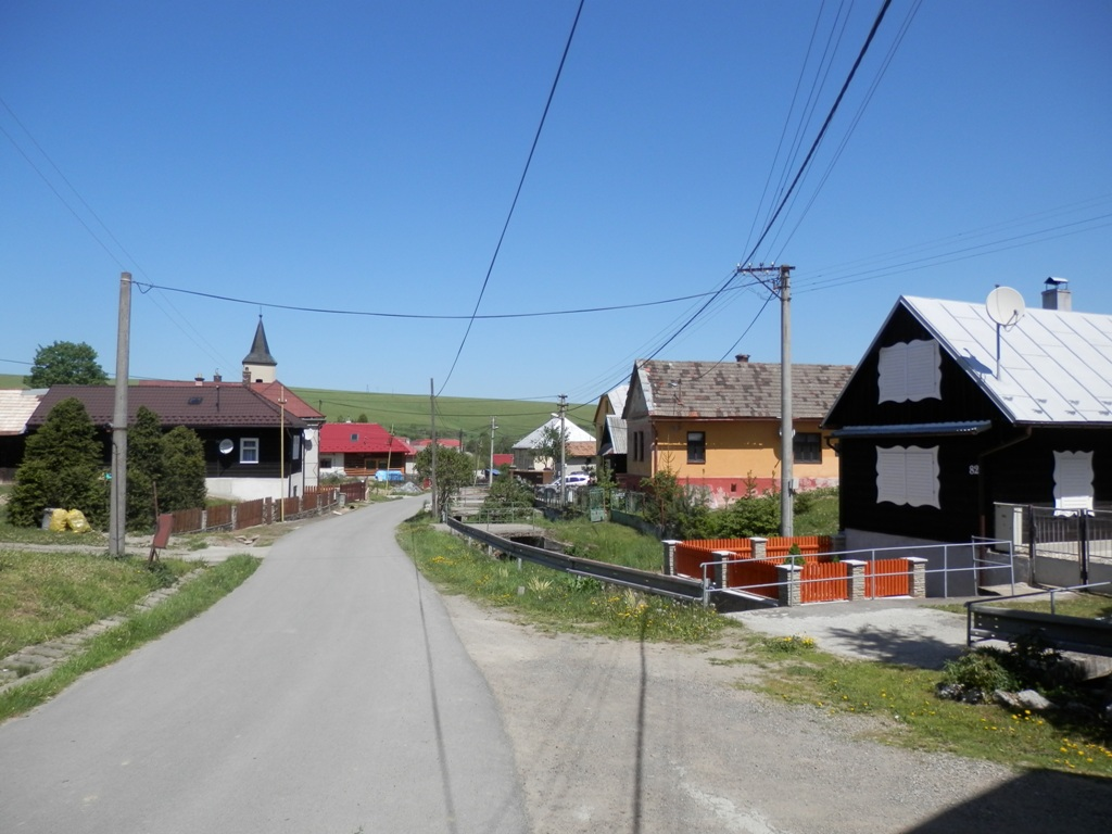 Obec Vislanka. Okres Stará Ľubovňa.